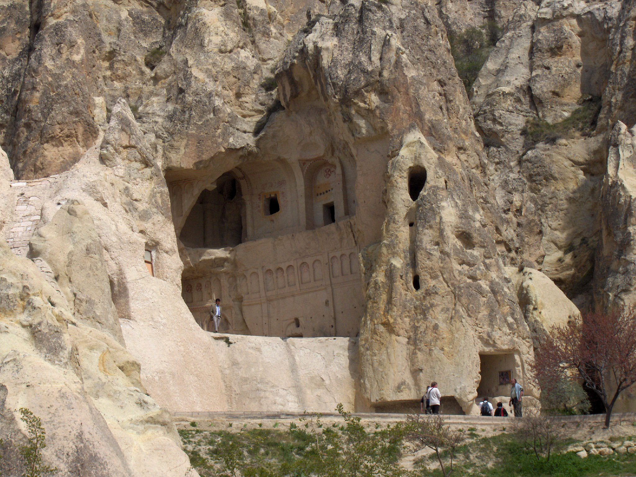 Göreme valley open air museum; Cappadocia, Turkey